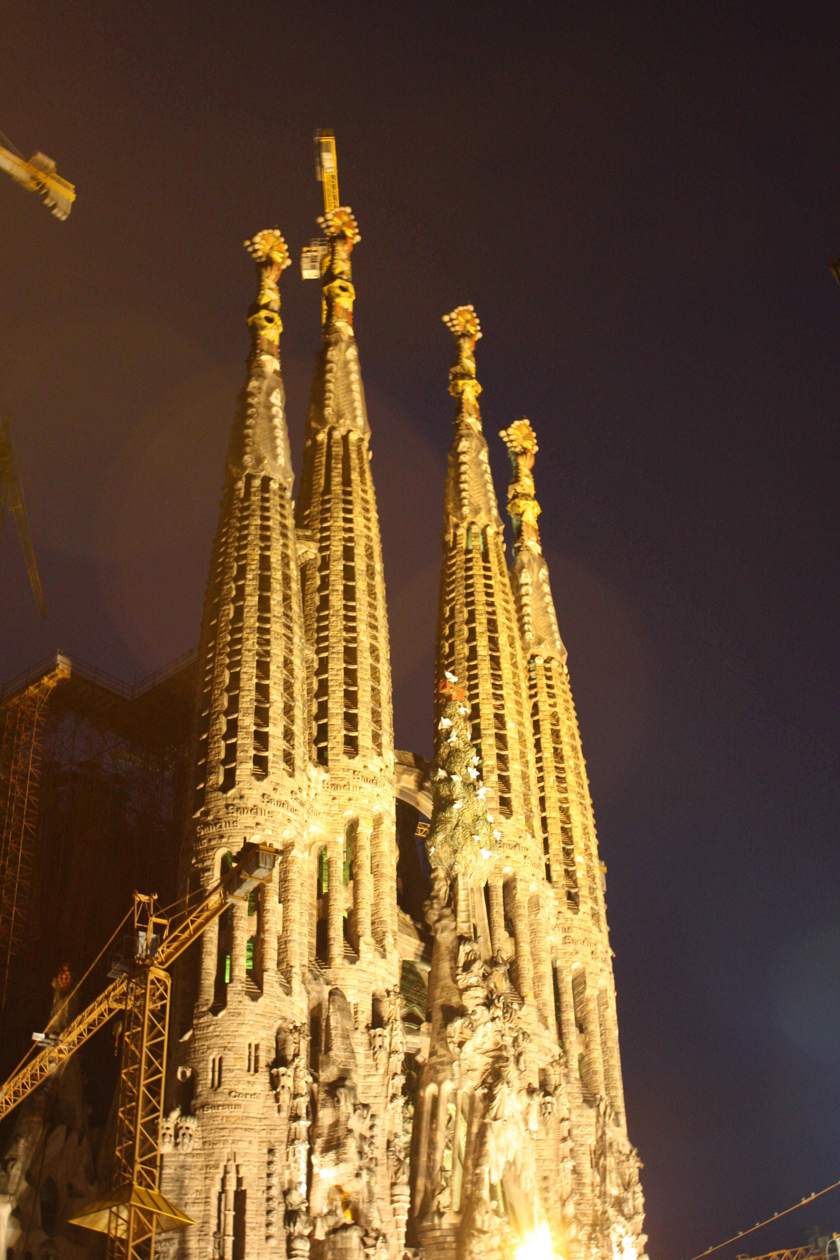 Barcelona Tres - 001